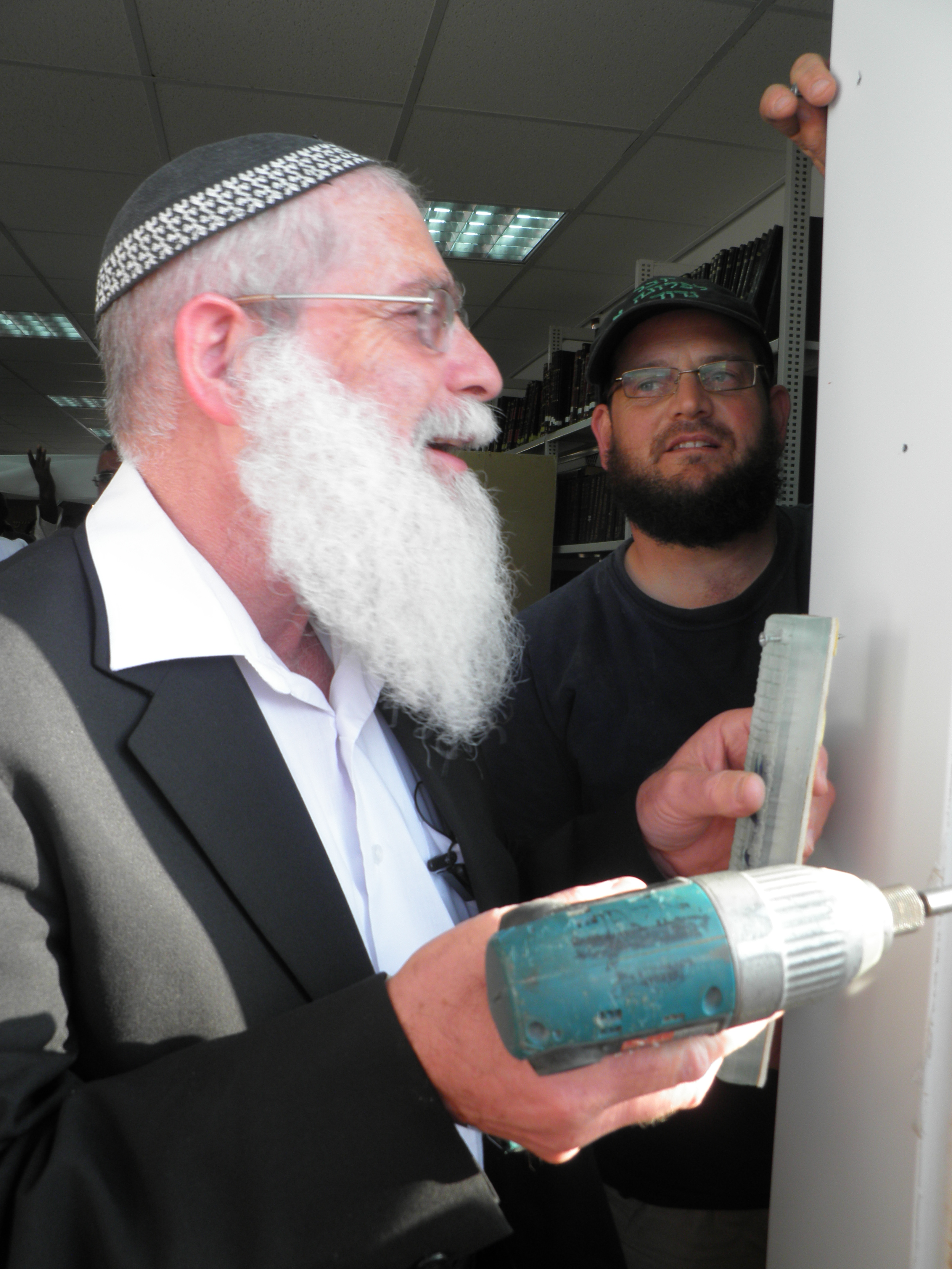 הרב אליקים לבנון קובע מזוזה בשבי דרום